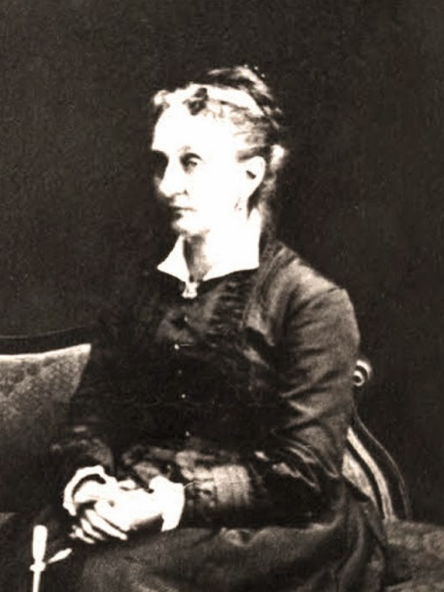 Corolina Zañartu Larraín, esposa de José Ignacio Larraín Landa; político chileno. Nació en Santiago en 1813. Falleció en la misma ciudad en 1892. Hijo de José Joaquín Larraín y Aguirre, heredero del Marquesado de Montepío y de Mercedes de Landa y de los Ríos. Tuvo una educación privilegiada, graduándose en 1836 como abogado de la Universidad de San Felipe. Fue madre de doce hijos. Fotografía de 1865